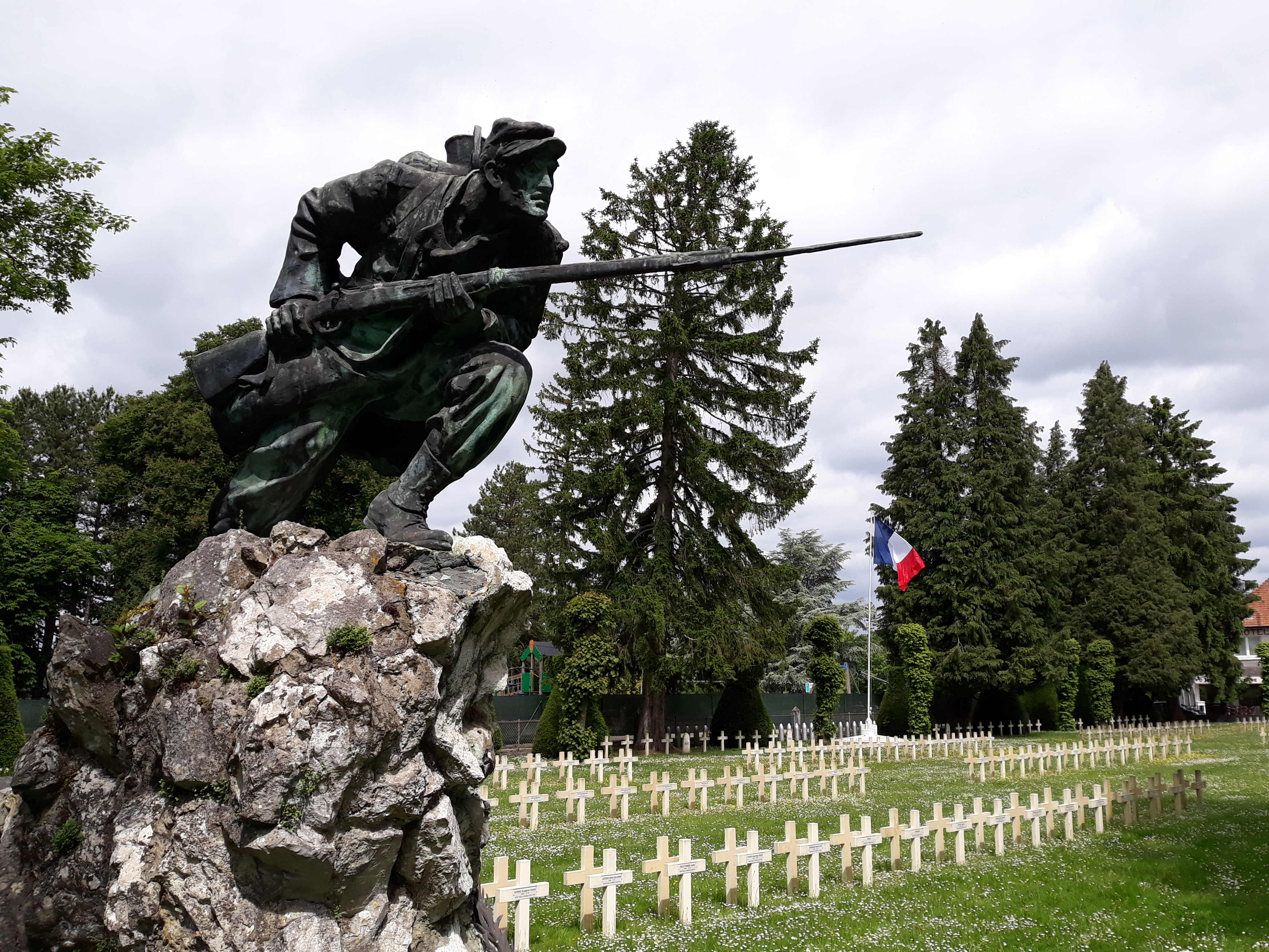 Dinant - Cimetière français - Le monument l'assaut (31 mai 2019)